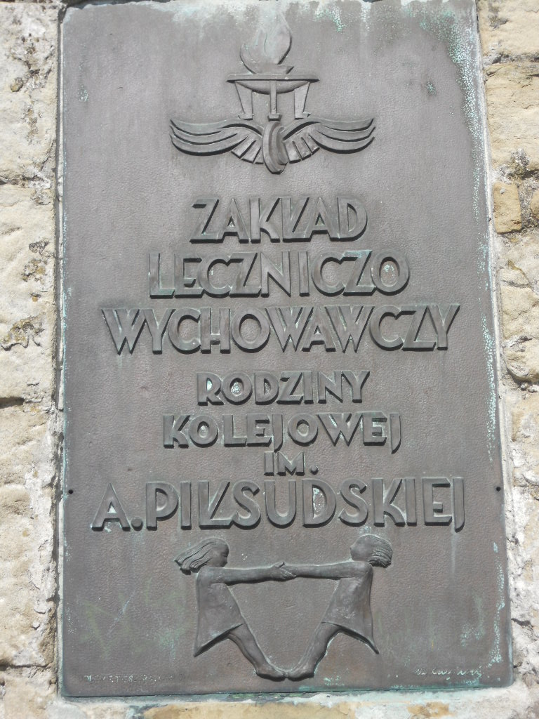 Tablica pamiątkowa przy bramie Sanatorium Rodziny Kolejowej im. Aleksandry Piłsudskiej (Lotos) przy ul. Kościuszki 18 w Rabce-Zdroju.